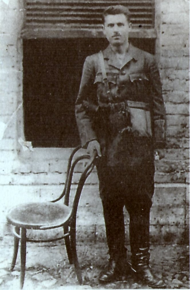 Алексей Долинин, руководитель Чапанного восстания, комендант восставшего Ставрополя